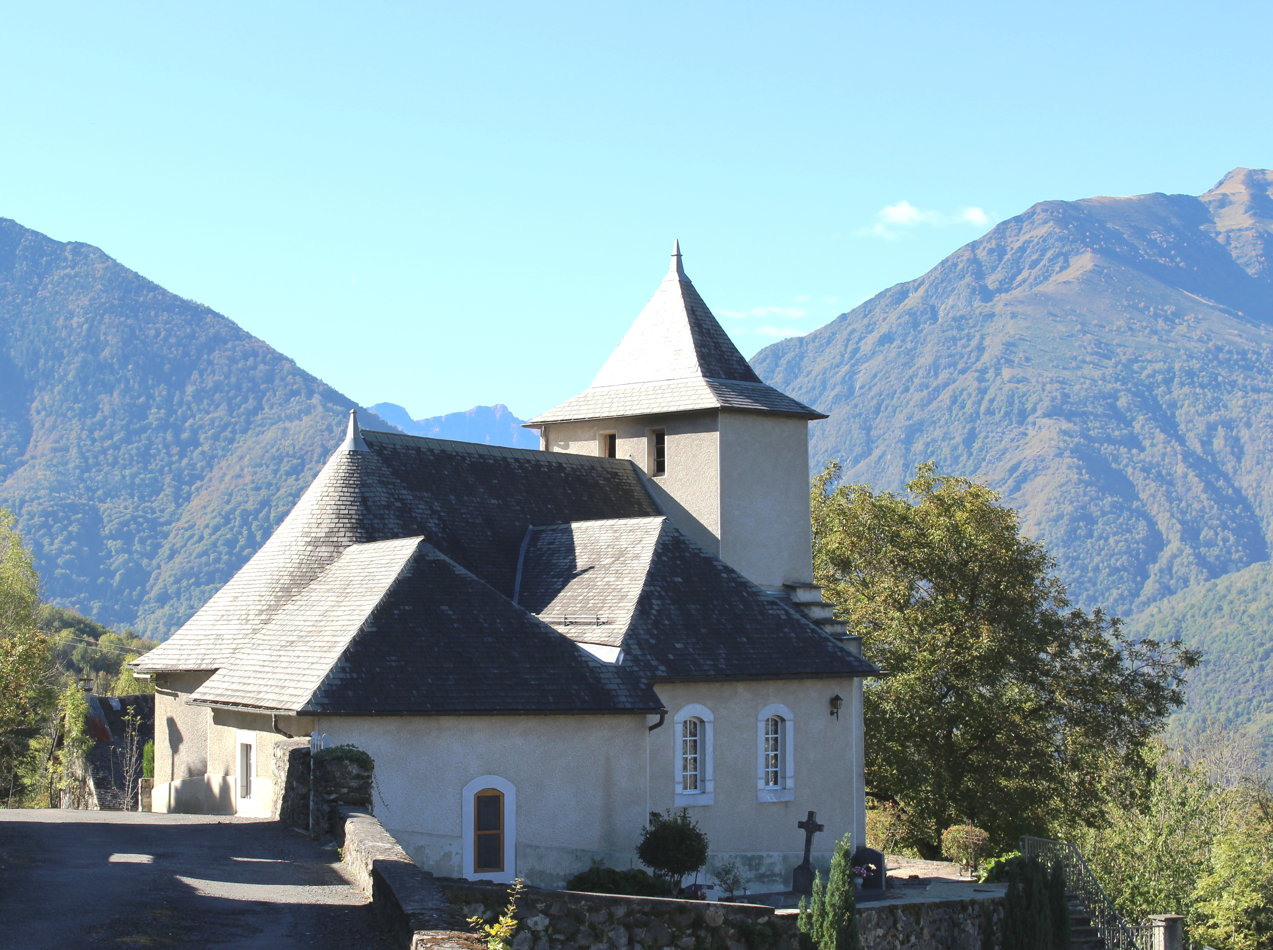 Église Saint-Pierre d'Artalens (Hautes-Pyrénées)